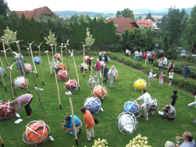 Ausstellung der Rolling Stars and Planets im Botansichen Garten Bela Beyer, Hartberg Steiermark 2009